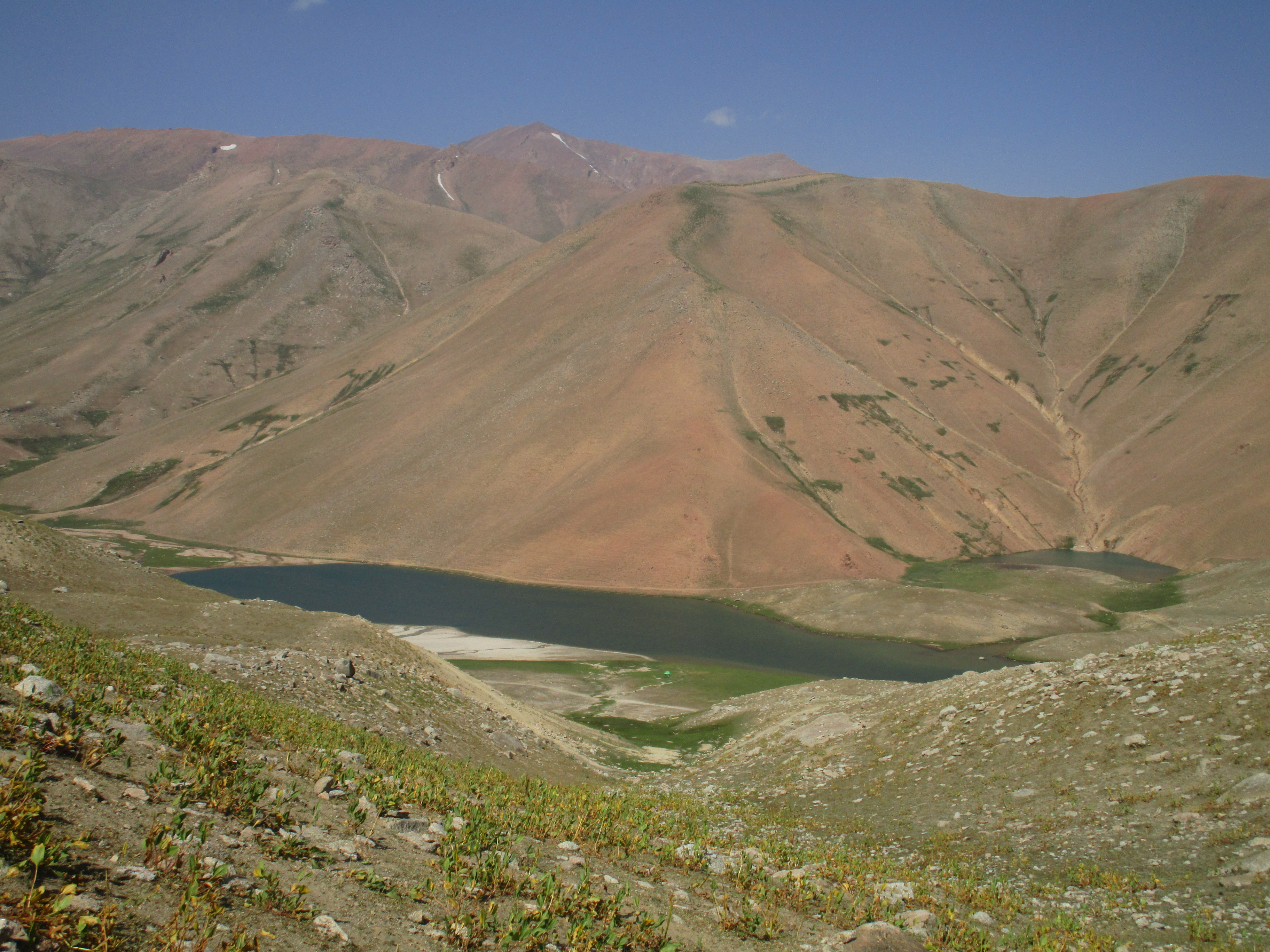 Наманганская область, Республика Узбекистан